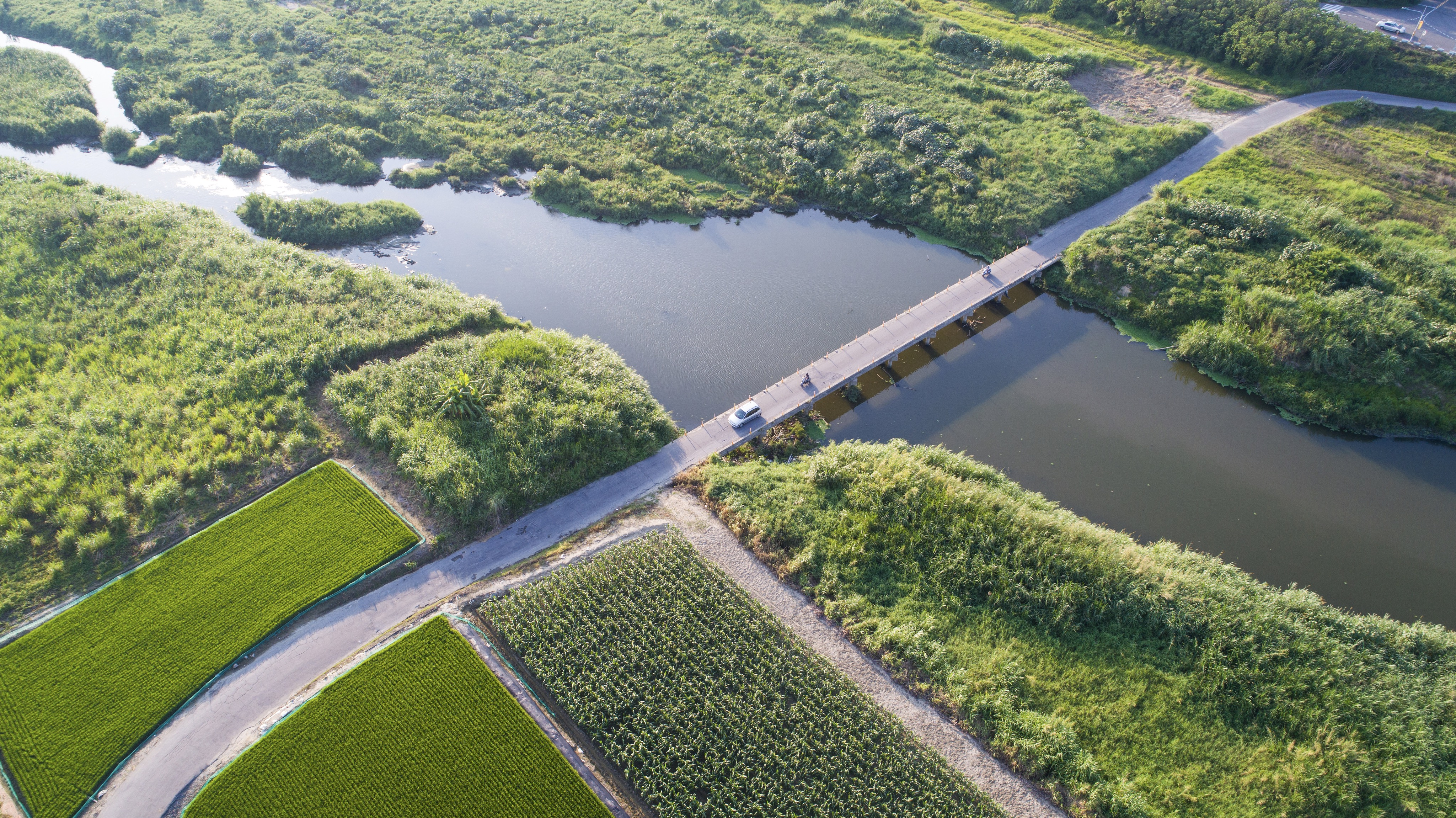 中文（台灣）: 新市區和平路便橋附近